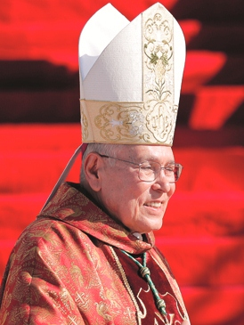 Dom Washington Cruz, arcebispo de Goiânia-GO